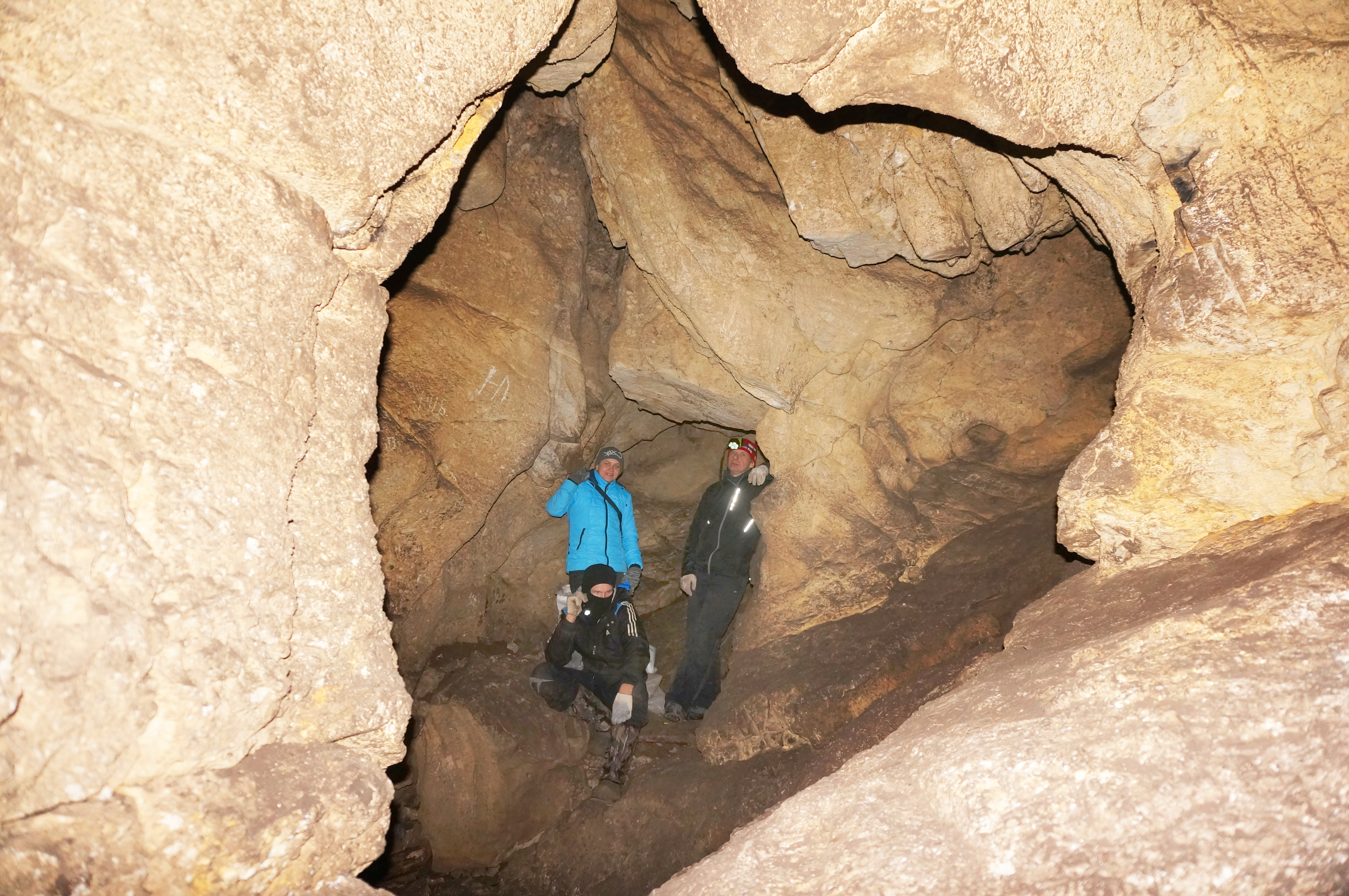 Жемерякский карстовый лог: Памятник природы Жемерякский карстовый лог расположен в лесостепной зоне Челябинской области на территории Увельского муниципального района в 8 километрах к западу от поселка Красногорский, на левом берегу р. Сухарыш, ниже д. Михири,Увельский район, Челябинская область This image is related to the protected area of Russia number 7410278